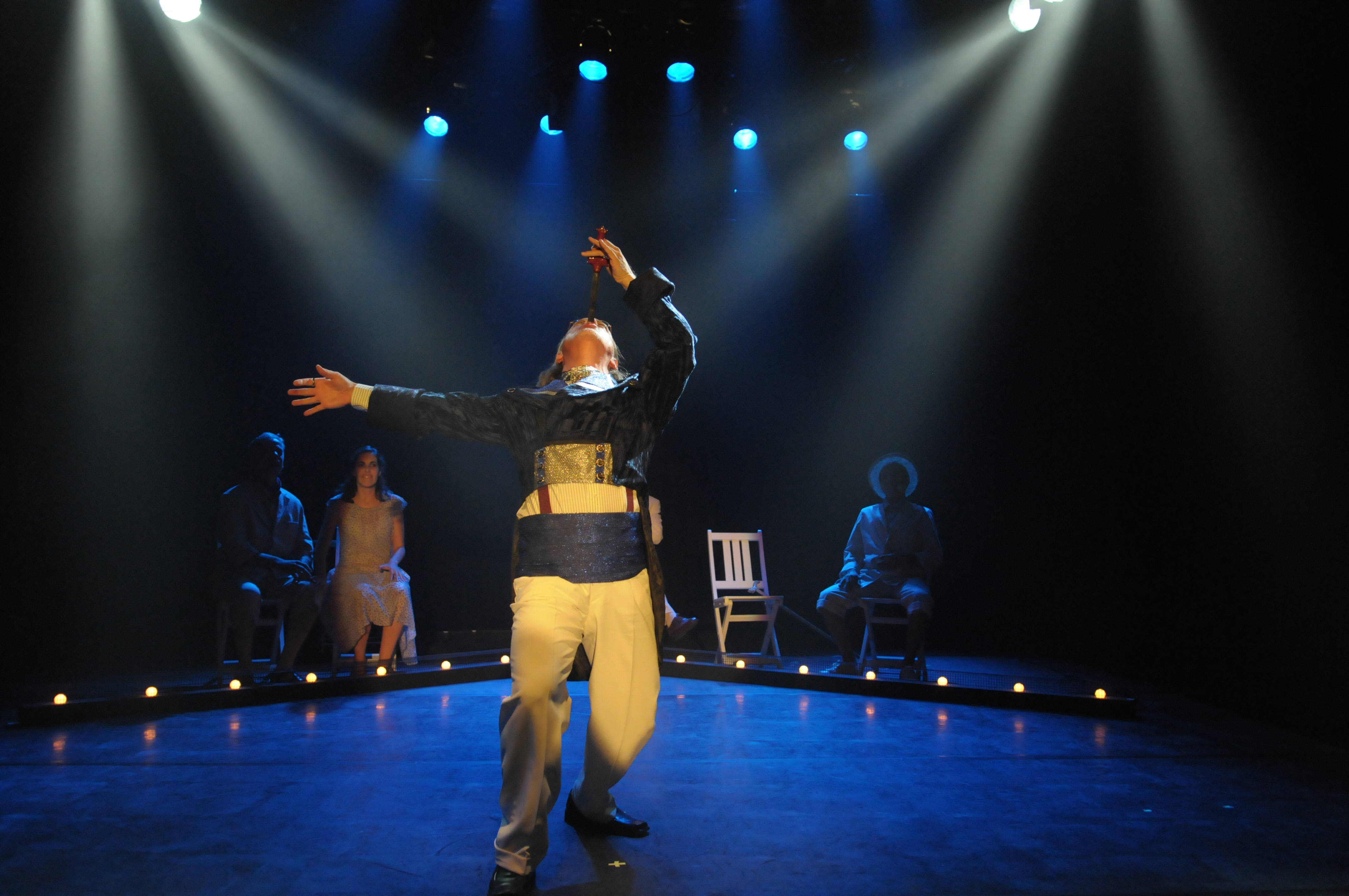 הקסם הגדול תיאטרון החאן בימוי אודי בן משה צילום גדי דגון